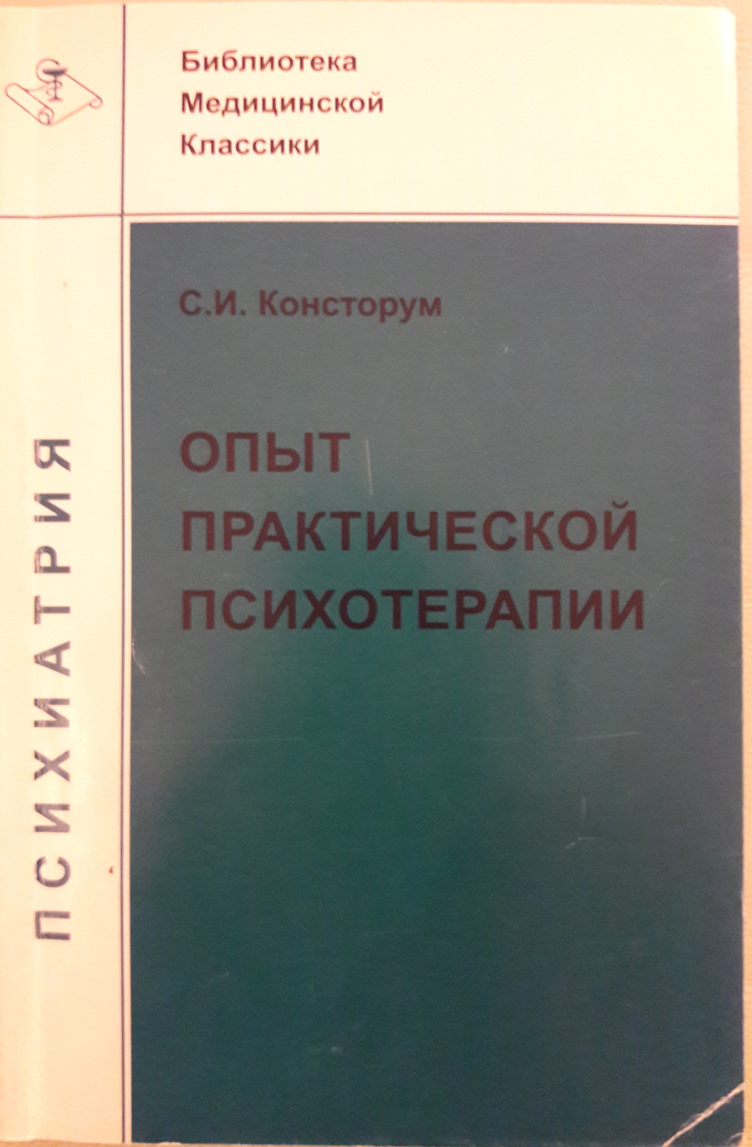 Консторум, Семен Исидорович (1890-1950). Опыт практической психотерапии / С. И. Консторум. - Изд. 3-е, стер. - Москва : Медицинская кн., 2010. - 172 с. : табл.; 20 см. - (Библиотека медицинской классики. Психиатрия).; ISBN 978-5-86093-401-6